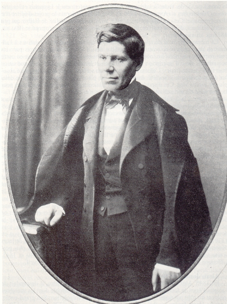 Portrait de Jordan